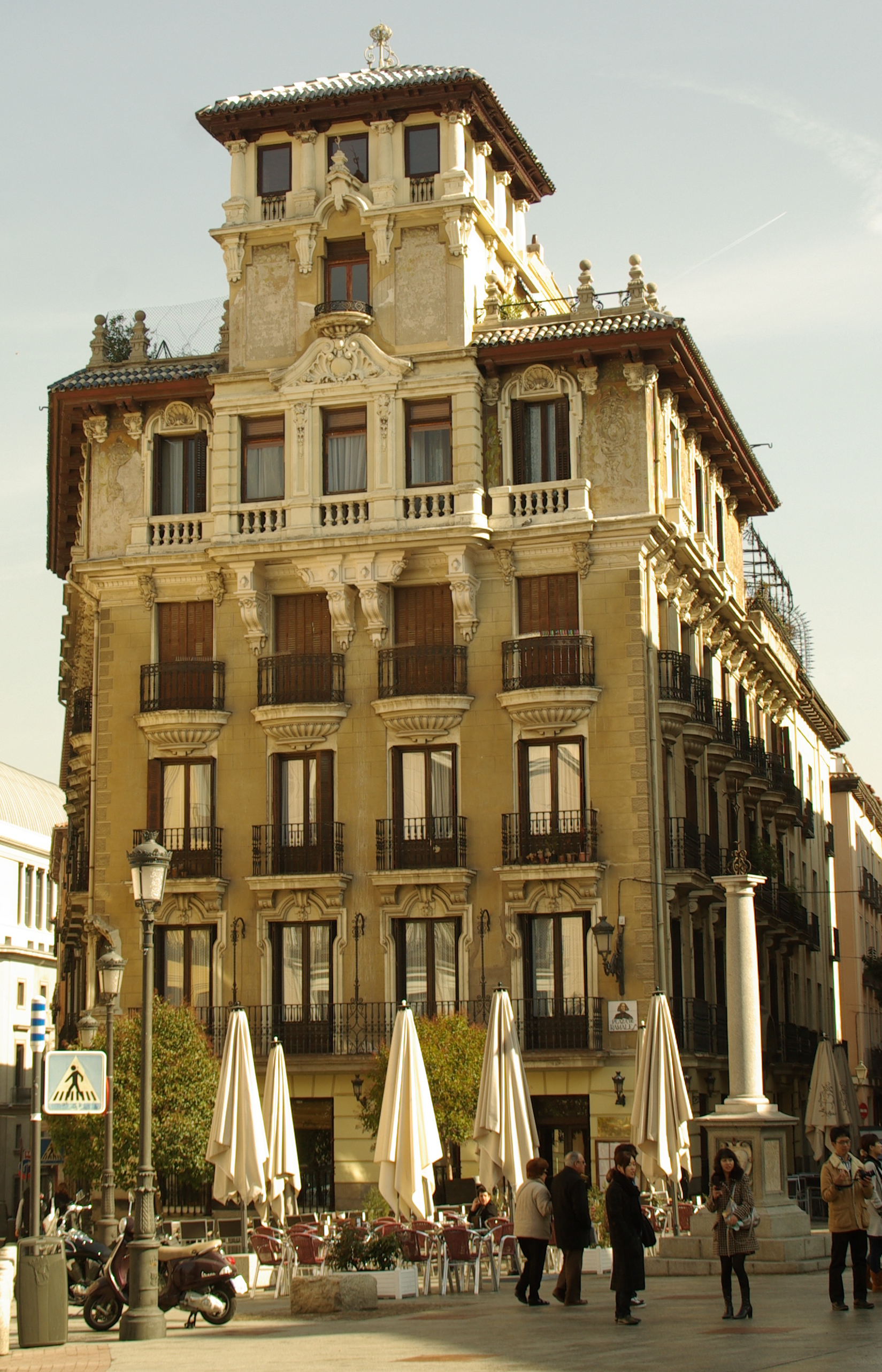 ® MADRID E.S.U. ARTECTURA-PLAZA DE RAMALES